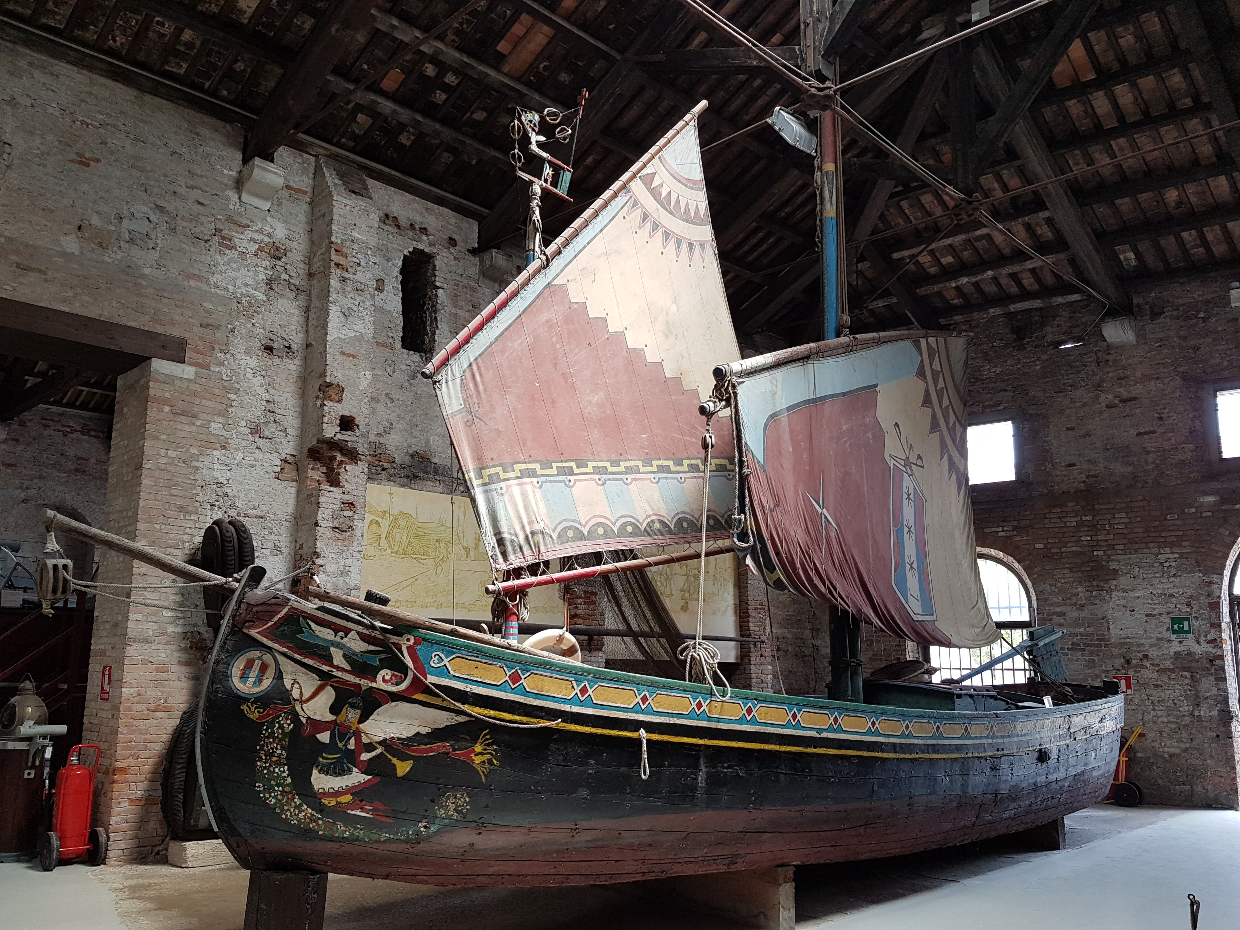 Venedig, Museo storico navale, Bragozzo, barca da pesca.